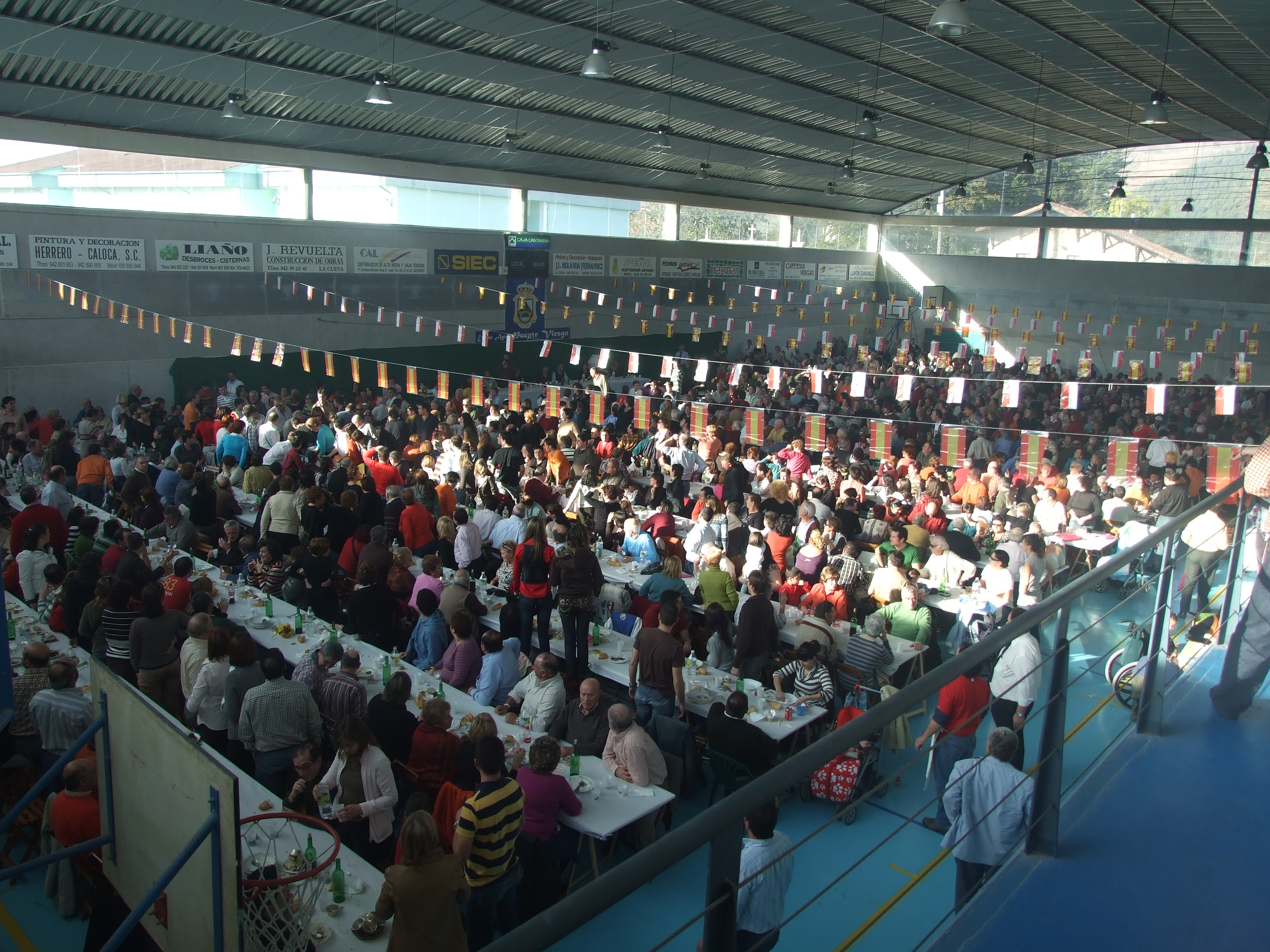 Fiesta de la Perola en Vargas, Cantabria